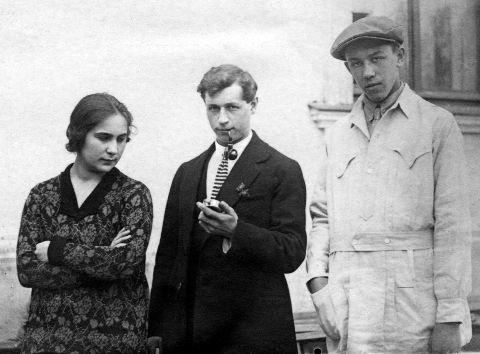 Мария Семёновна Ильина и Cергей Иванович Маркин